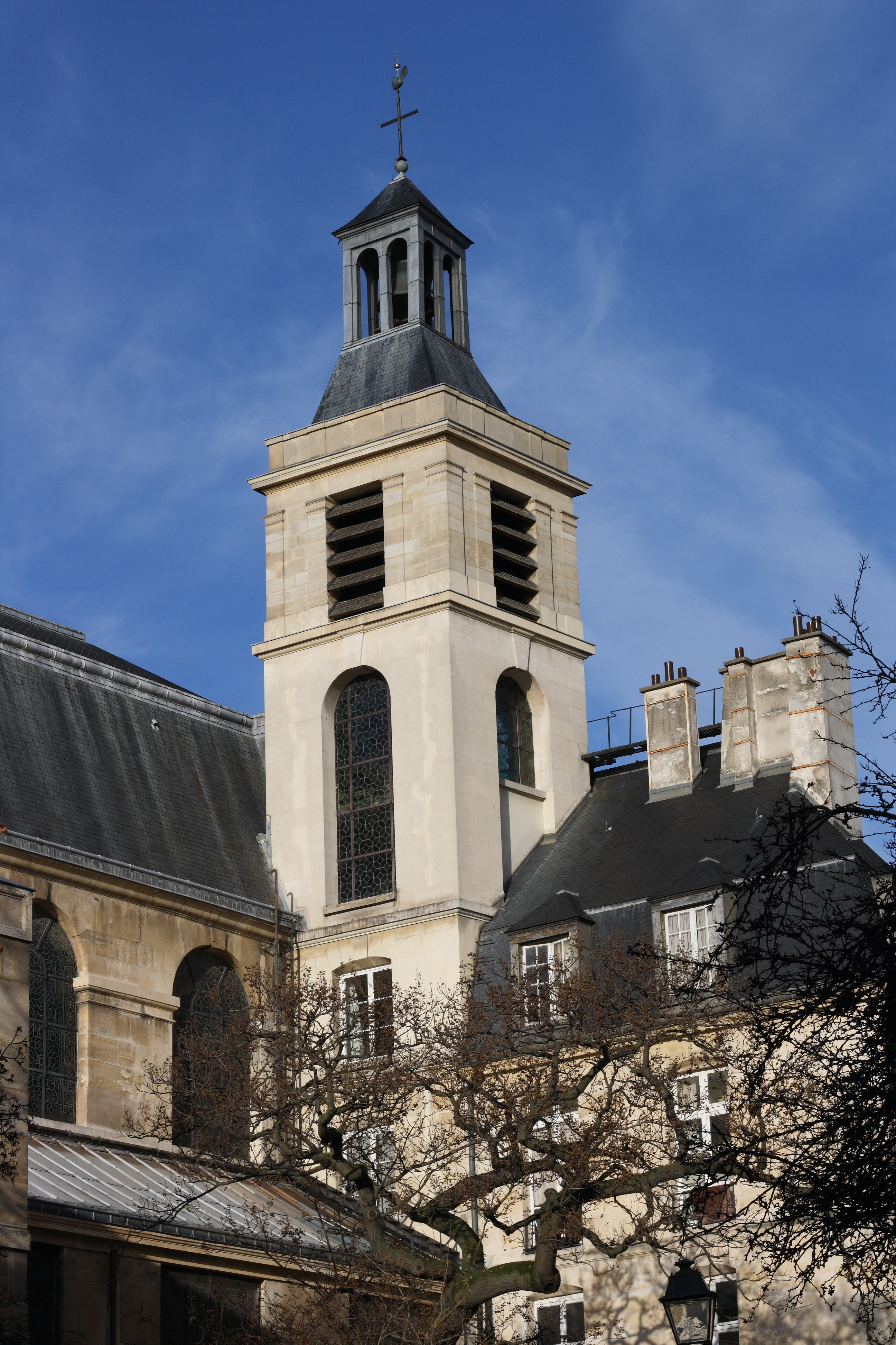 Katholische Kirche Notre-Dame-des-Blancs-Manteaux im 4. Arrondissement in Paris, Ansicht von Osten